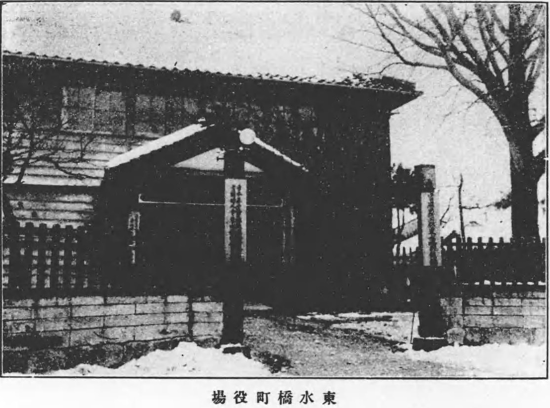 中新川郡東水橋町役場